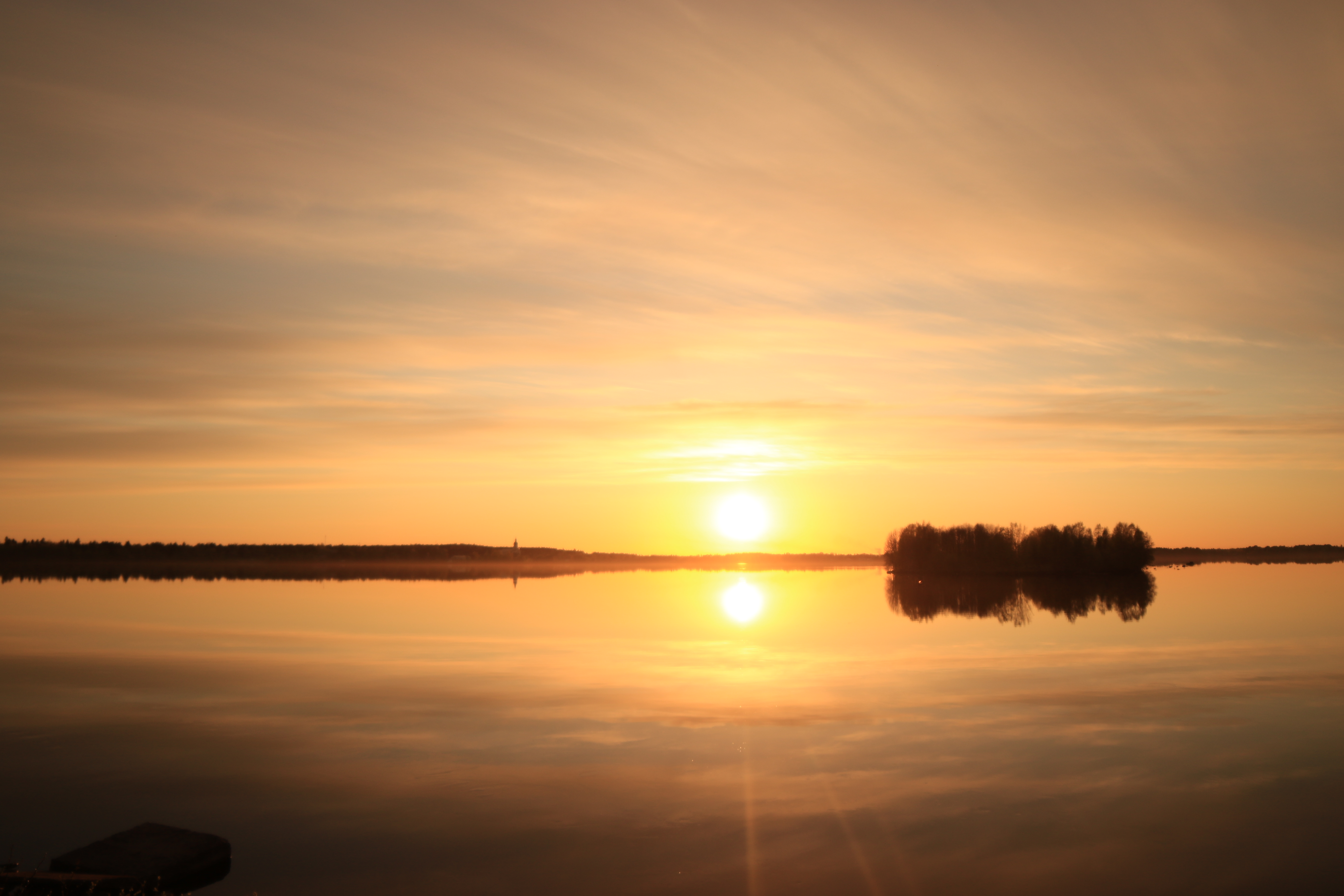 Kemijoki Keminmaan kohdalla.